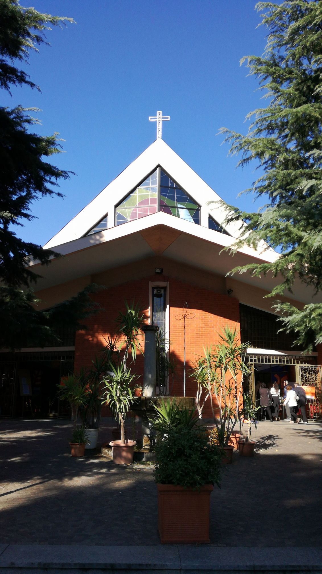 Chiesa SS. Nome di Maria, Mirafiori Nord, Torino